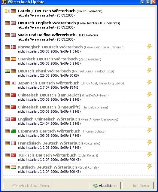 Programmfenster der Update-Funktion von LingoPad Erlaubnis zur Veröffentlichung vom Programmautor (Mario Müller) gegeben.